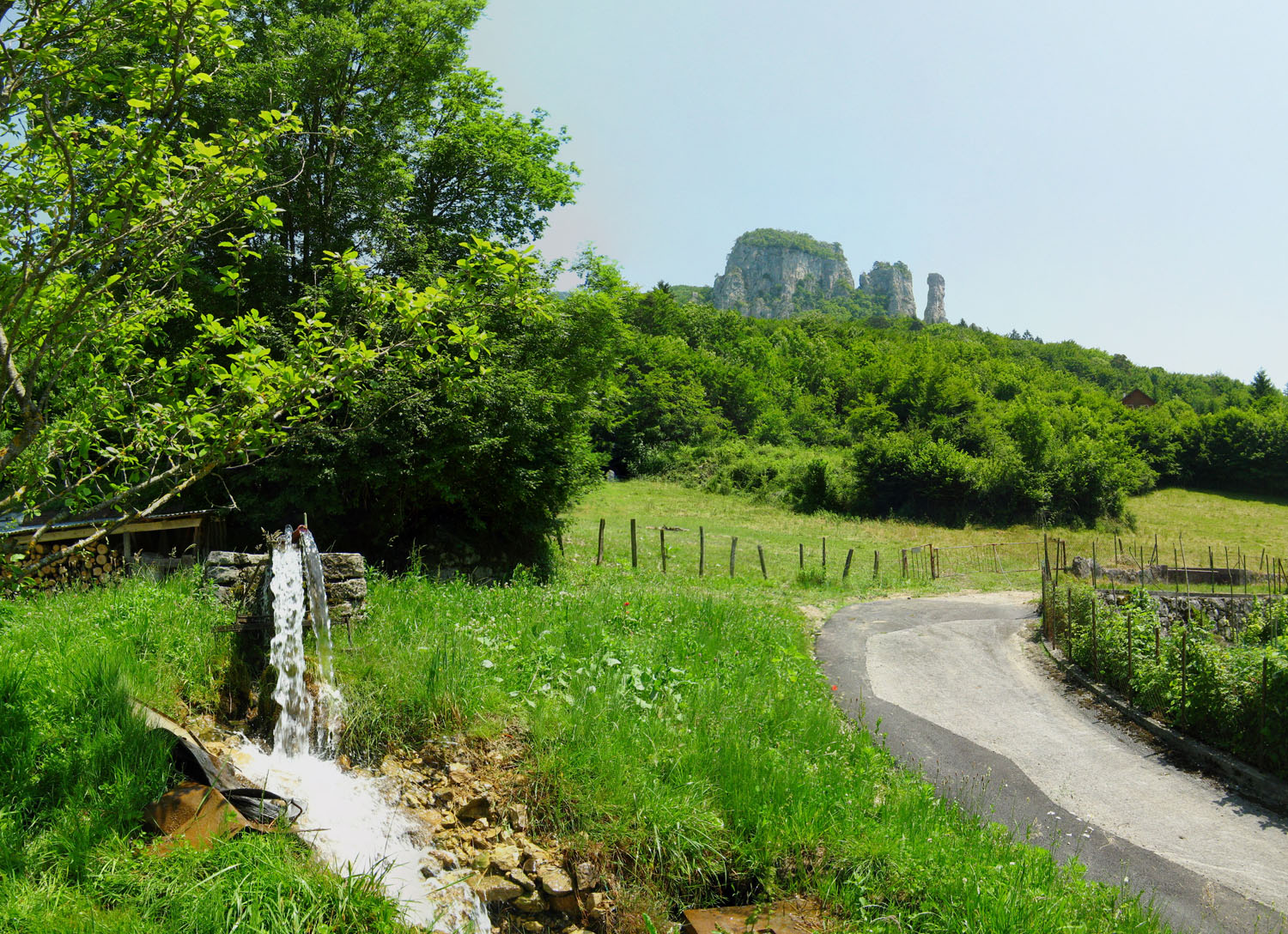 Tours Saint-Jacques. Cheminées de fées, à Allèves, Haute-Savoie, France.